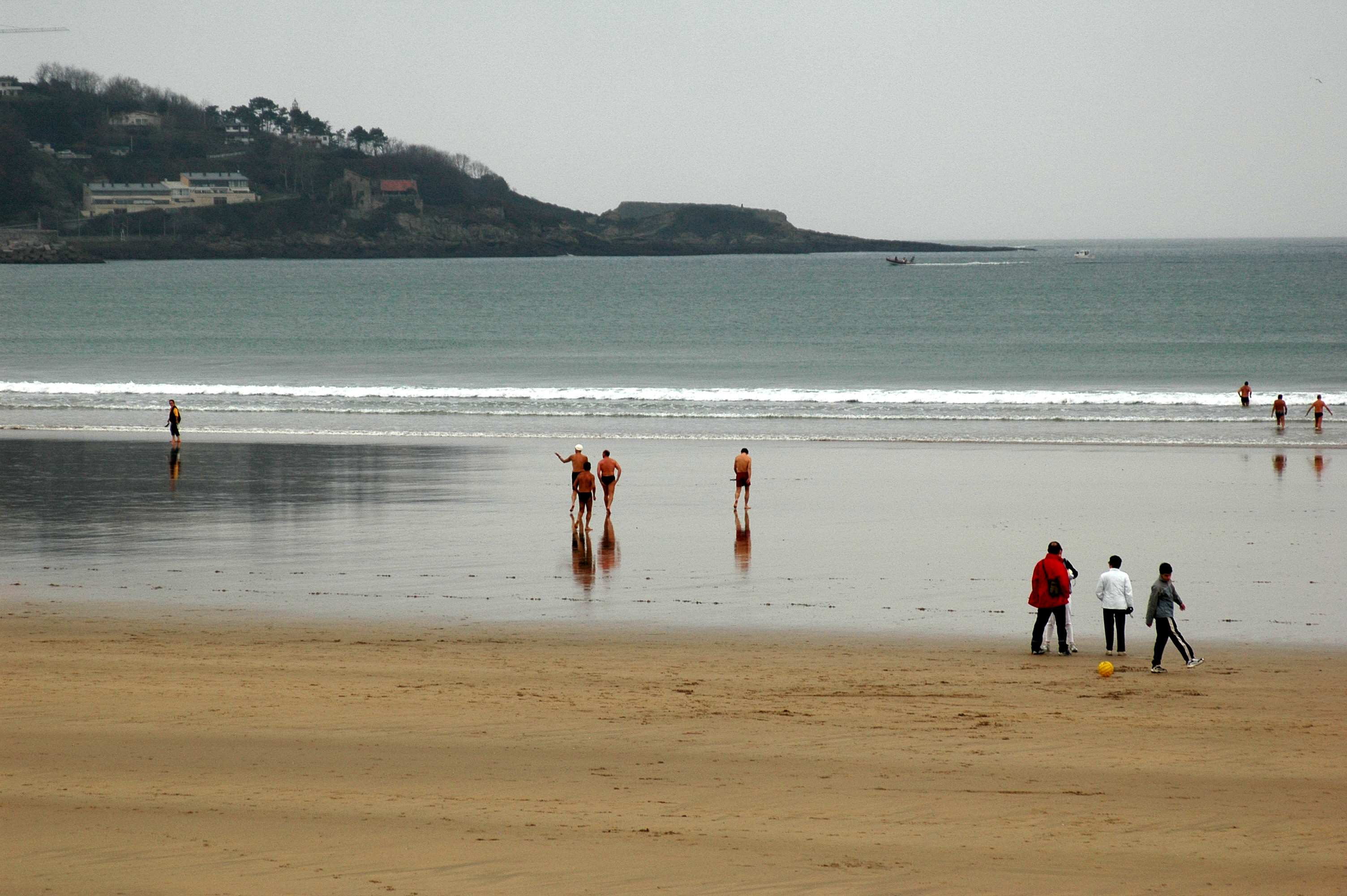 Hendaye, baigneurs en janvier. Photo prise le 06/01/07 par Harrieta171